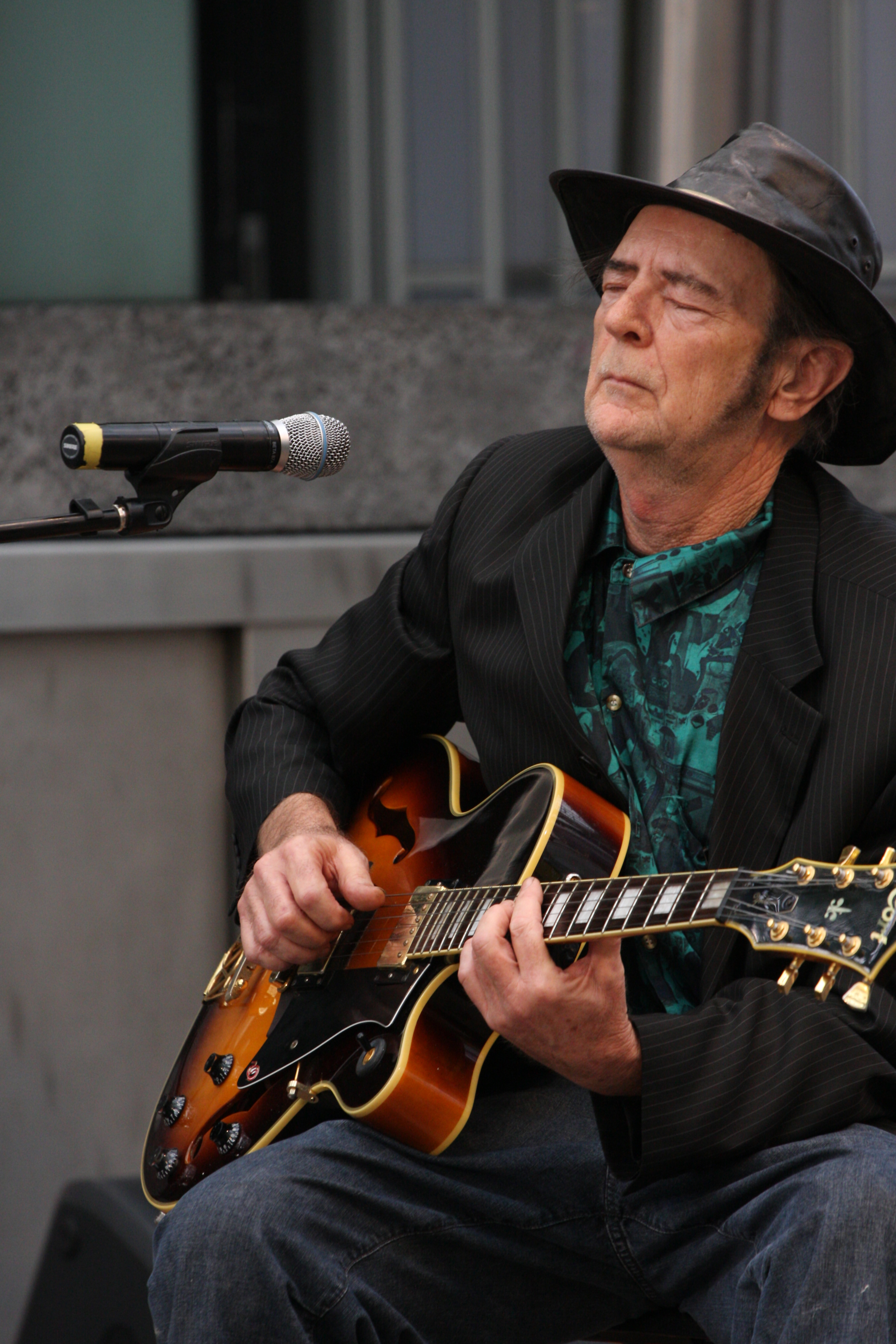 Fete de la Musique Brisbane 2010